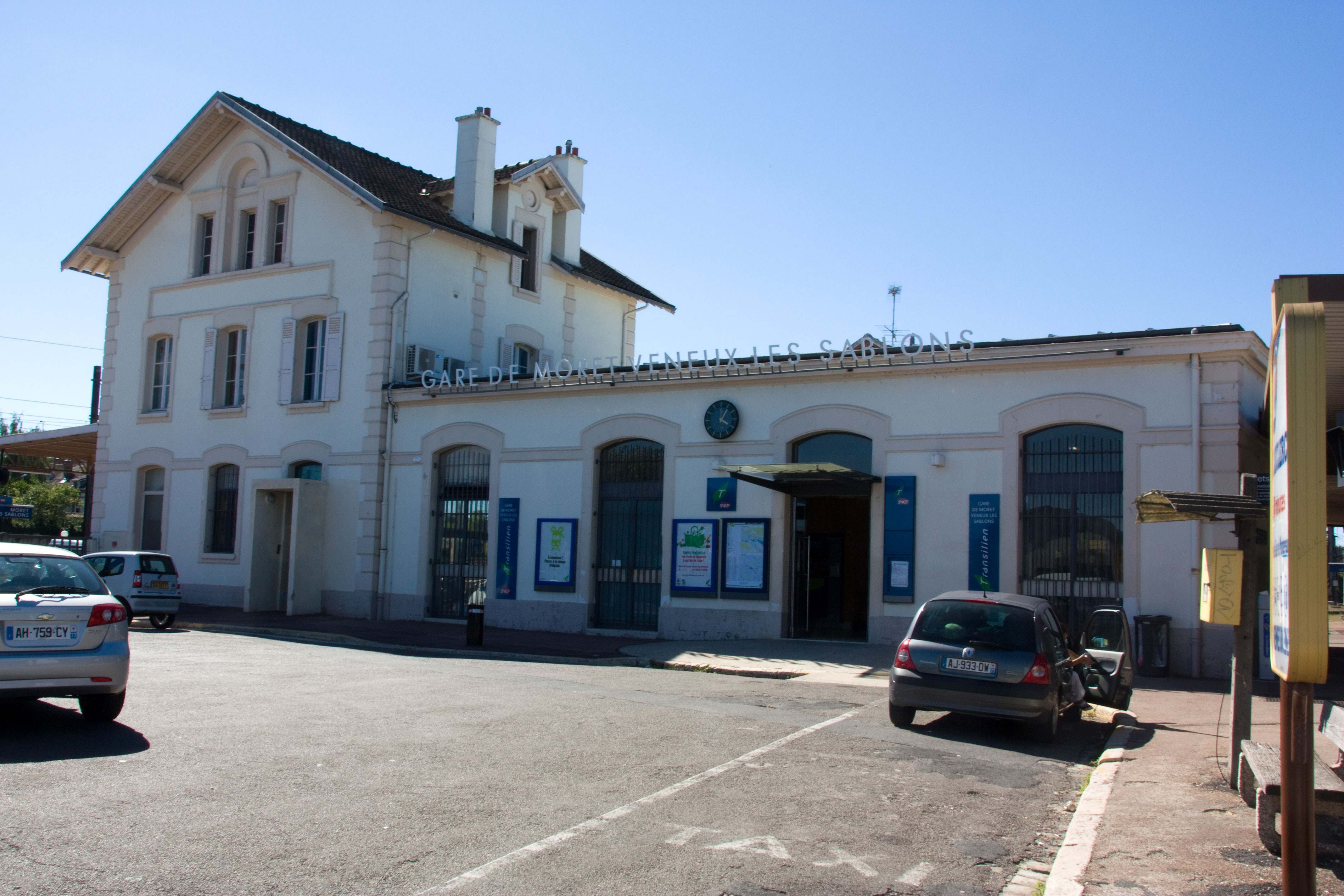 Gare de Moret - Veneux-les-Sablons, Veneux-les-Sablons, Seine-et-Marne, France